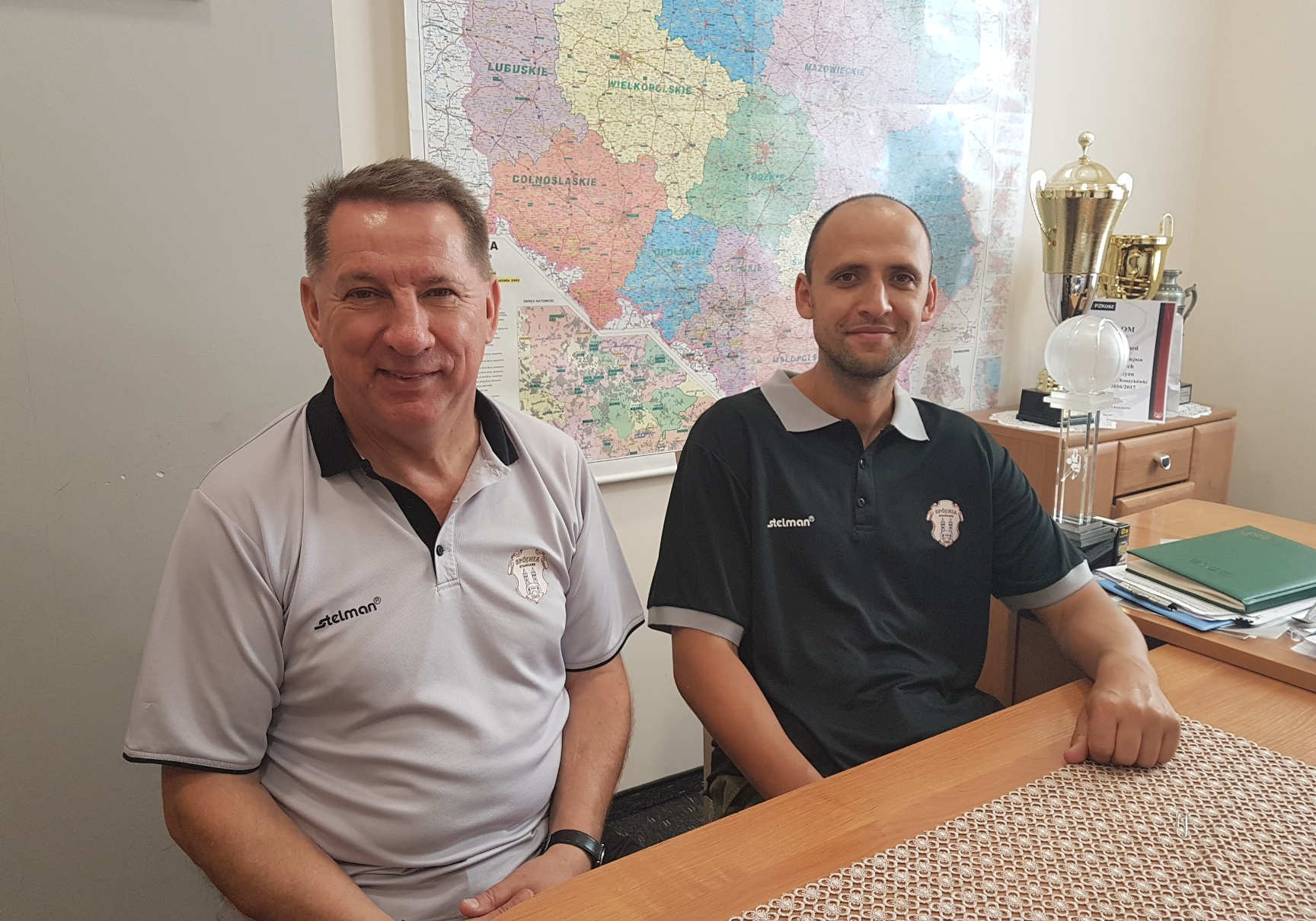 Trenerzy Spójni: Krzysztof Koziorowicz i Kamil Piechucki